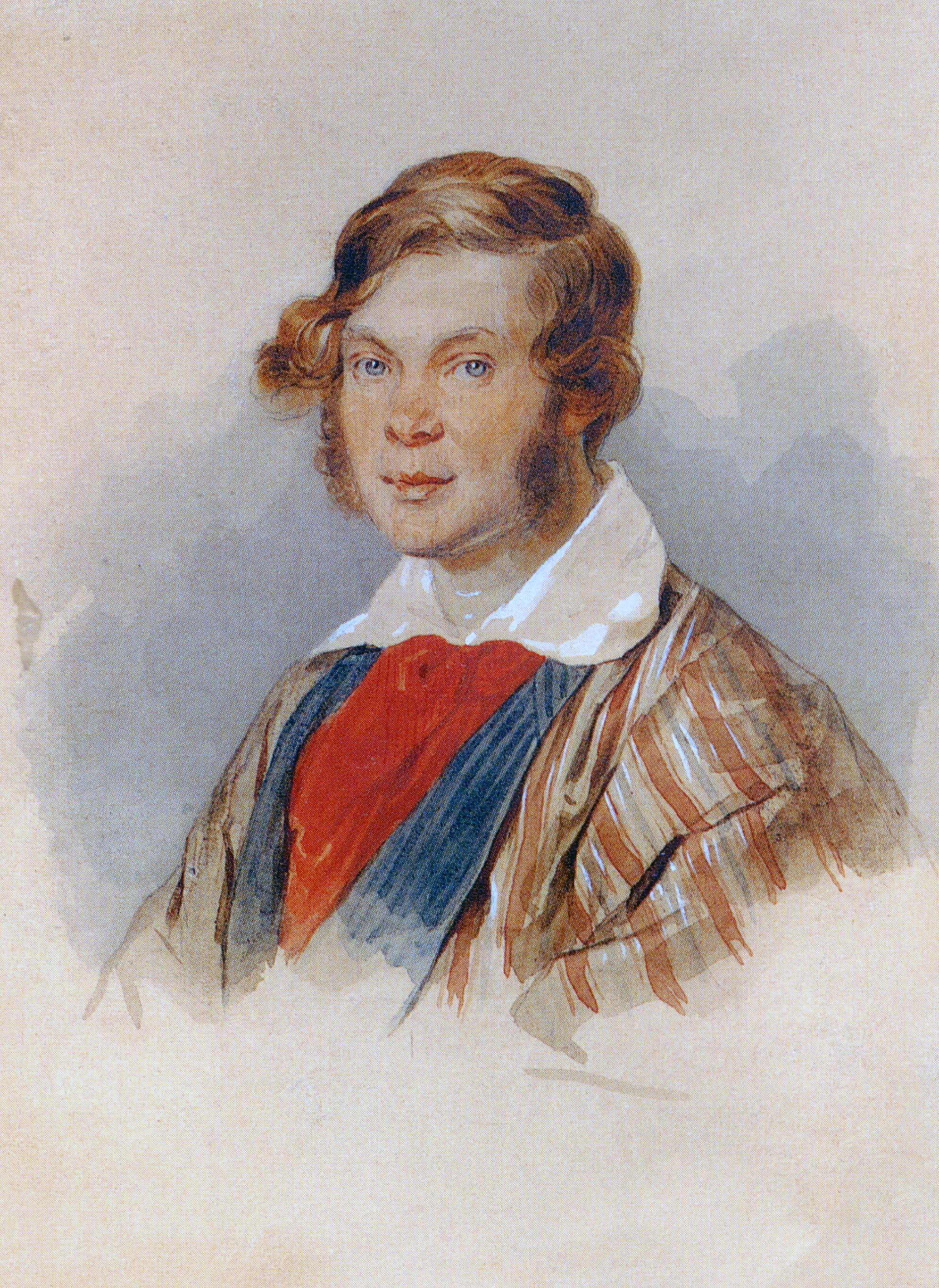 Князь Пётр Андреевич Вяземский (1792–1878)